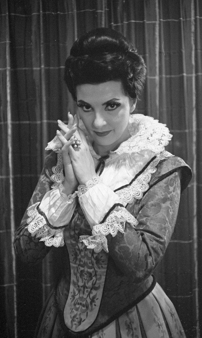 Opera I. Puritani in Stadsschouwburg. Anna Moffo